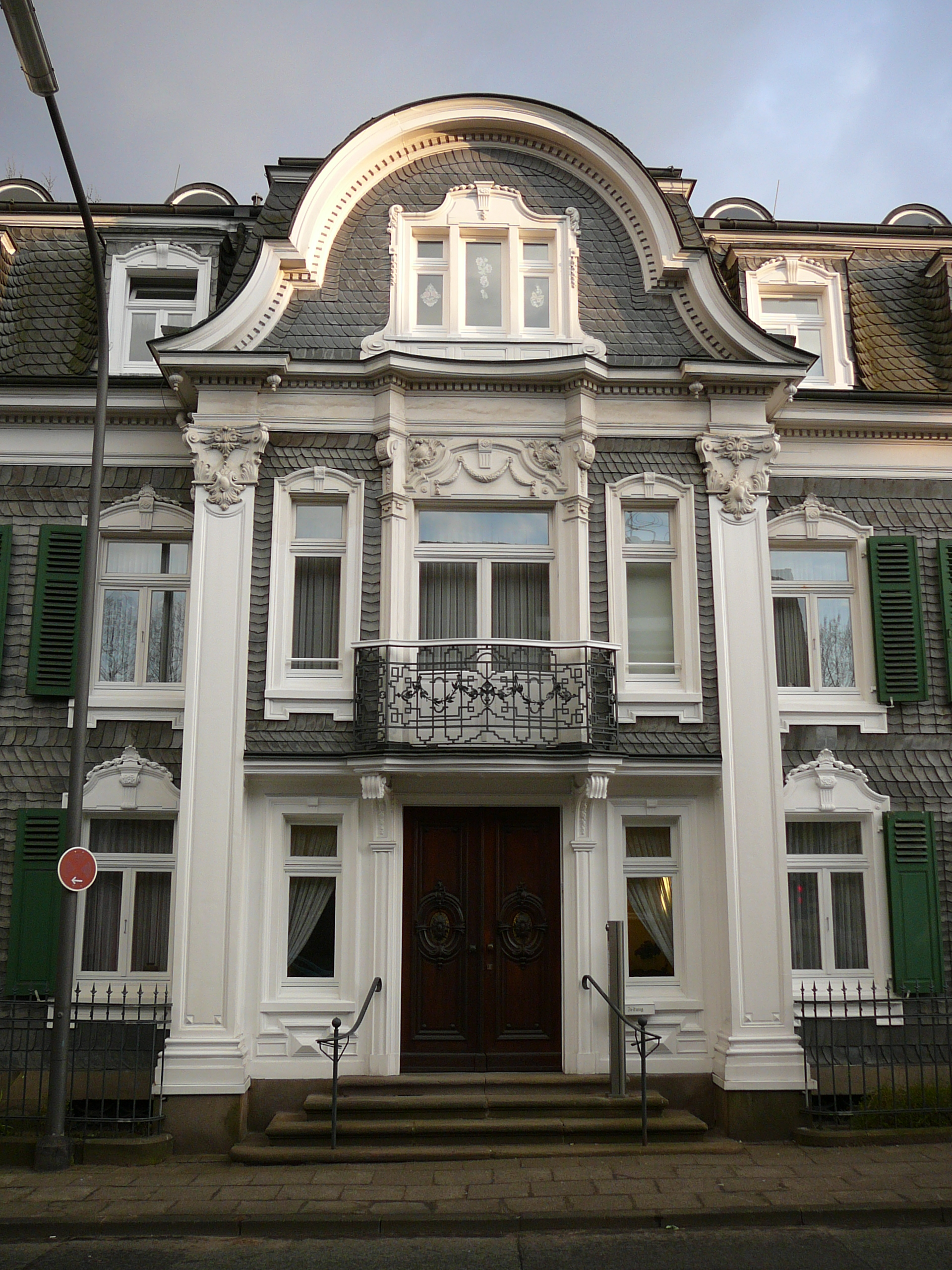 Am Diek, Wuppertal/Oberbarmen